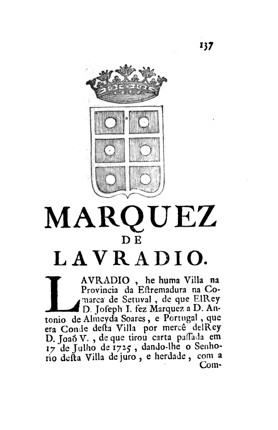 Antonio Caetano de Sousa: "Memorias Historicas e Genealogicas dos Grandes de Portugal", 3.a ed., 1755, p. 137 - Marqueses de Lavradio